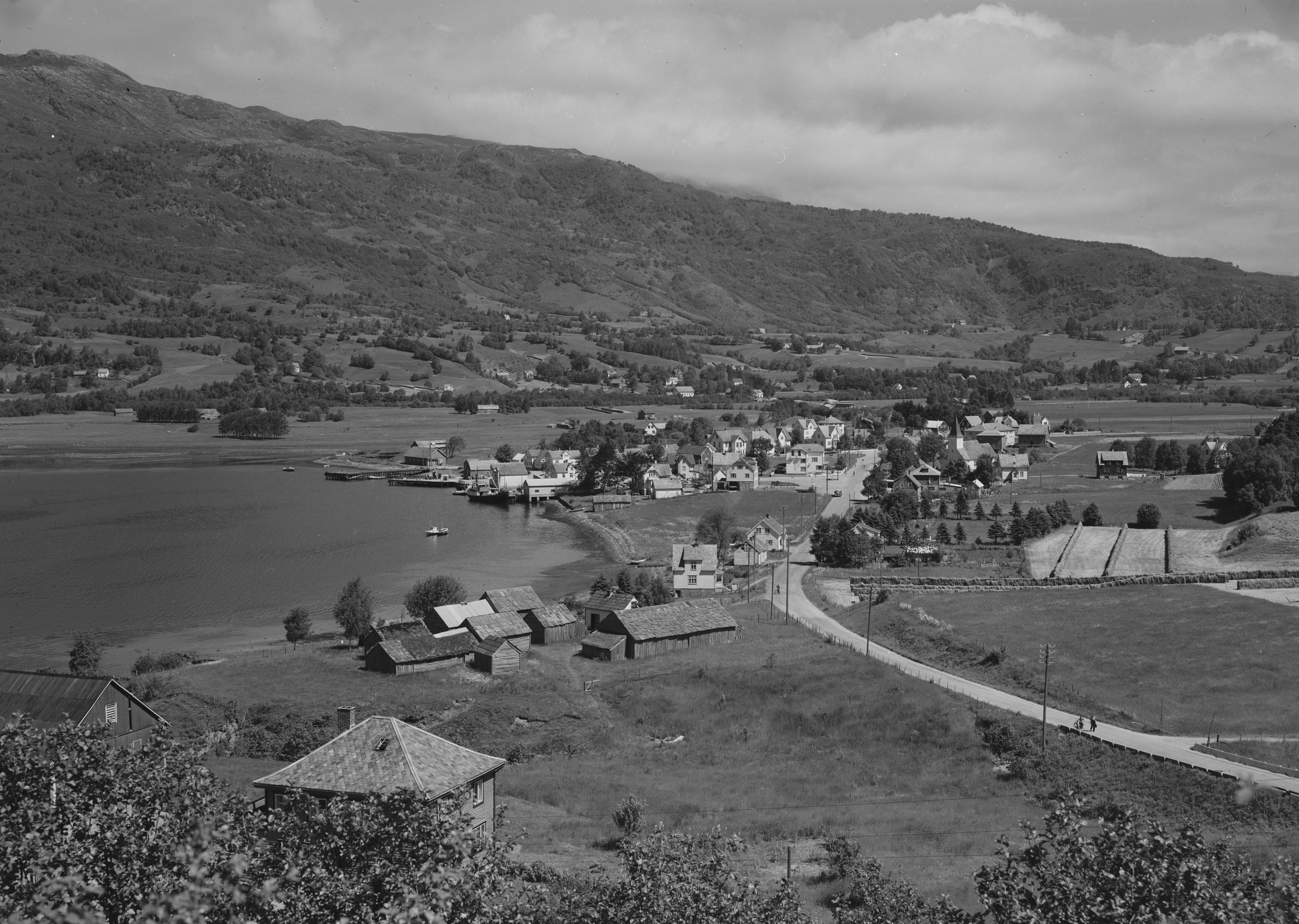 Bildet er hentet fra Nasjonalbibliotekets bildesamling. Anmerkninger til bildet var: Fotograf ukjent. Etne, Etne, Hordaland